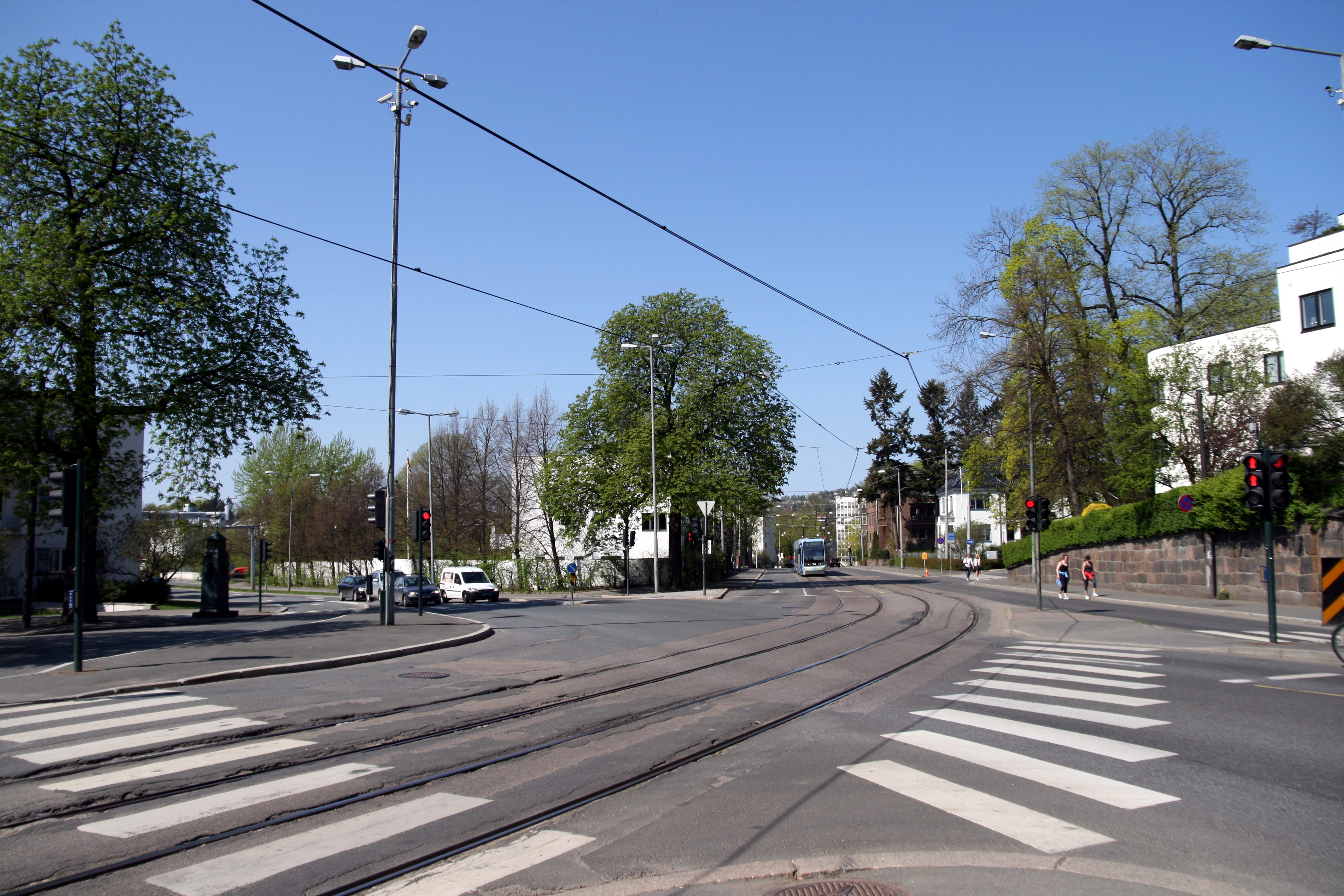 Olav Kyrres plass på Frogner i Oslo.